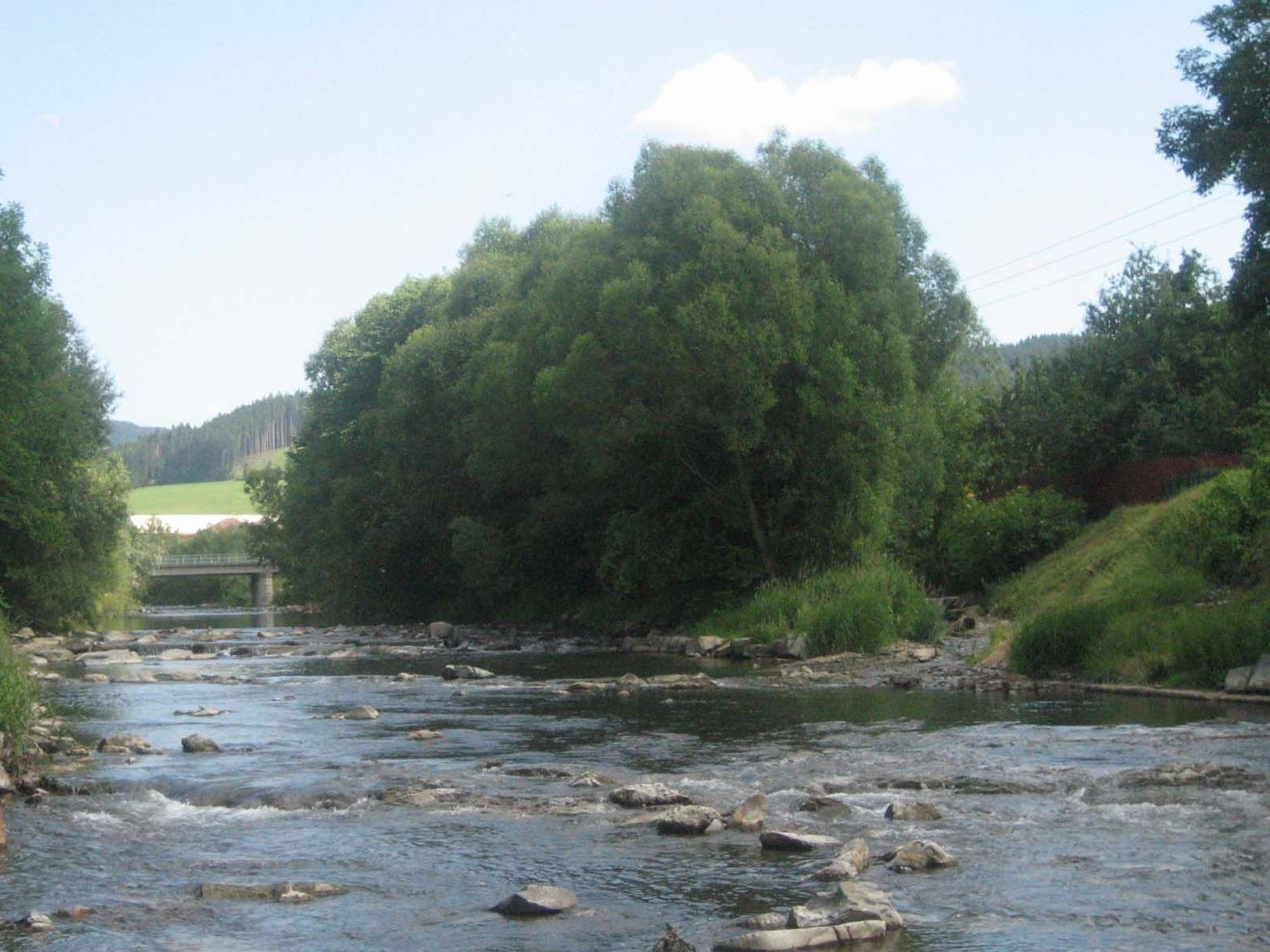 Ústí Hořanského potoka do Vsetínské Bečvy